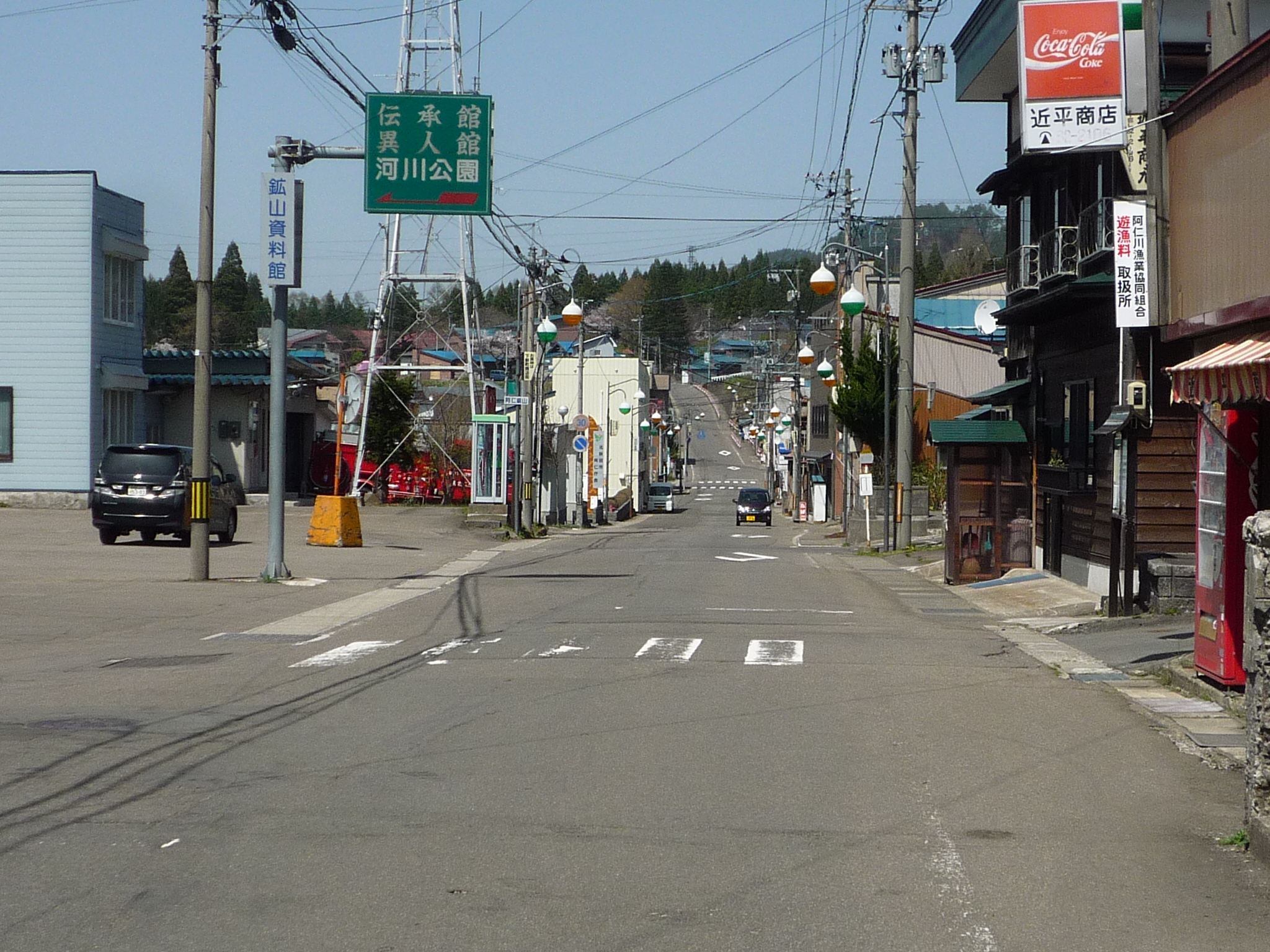 阿仁駅前